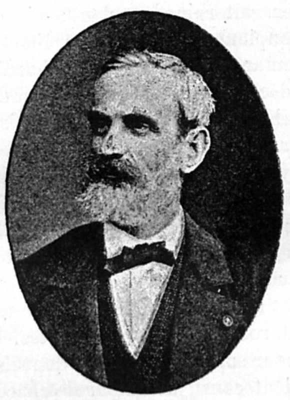 Retrato del ingeniero Henri de Dion (1828-1878)